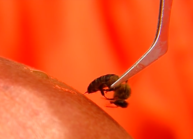 Aguijón de abeja siendo aplicado sobre la piel de un paciente en una sesión de apiterapia.